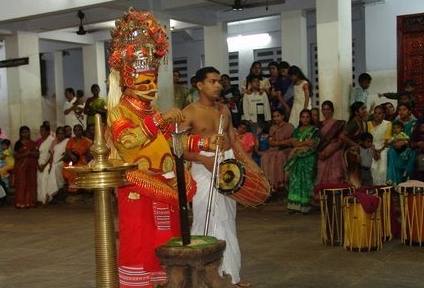 Sree Muthappan, Parassinikkadavu temple, Kannur district, Kerala.